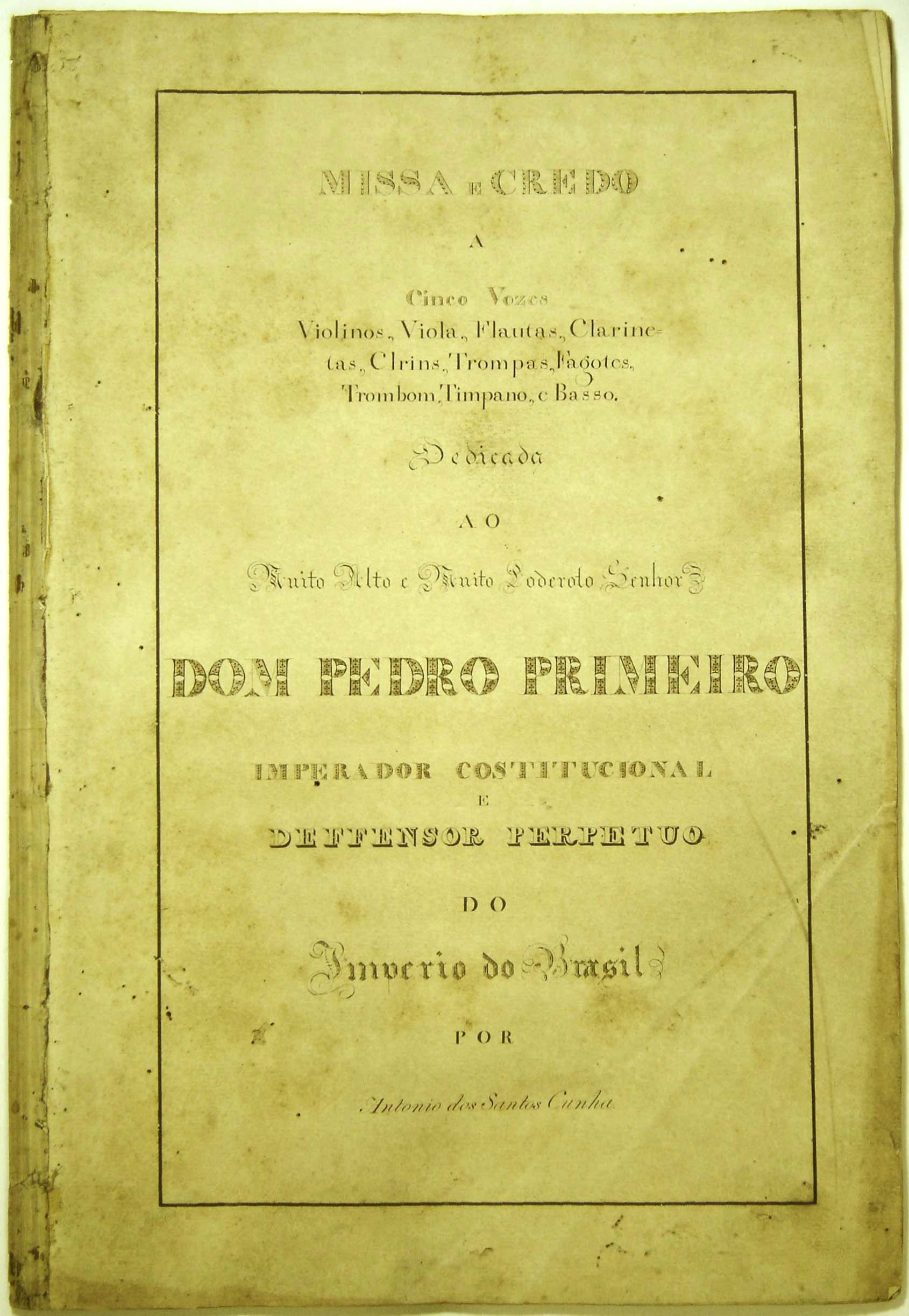 Missa e Credo a Cinco Vozes, de Antônio dos Santos Cunha (1822)